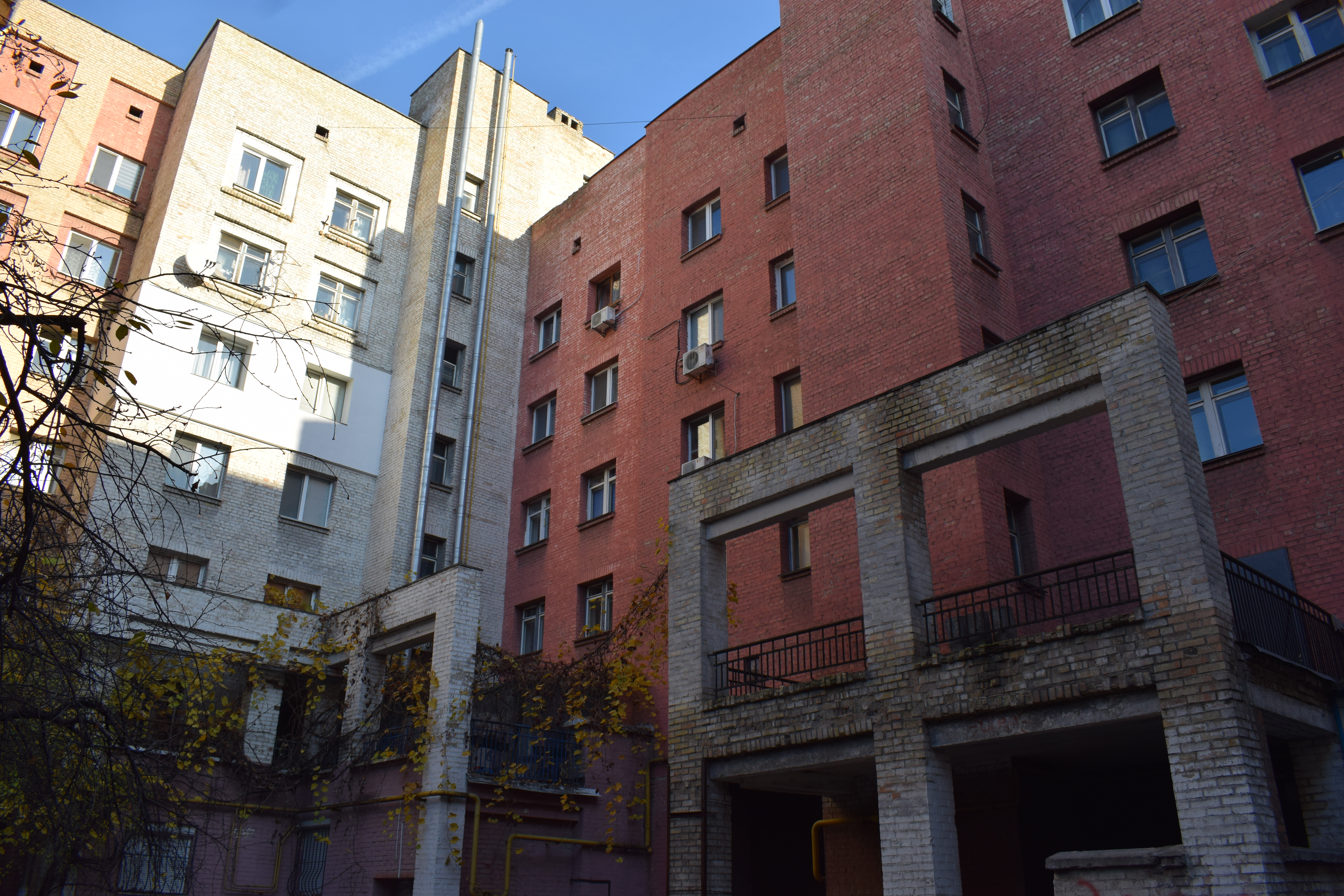 Фото двору